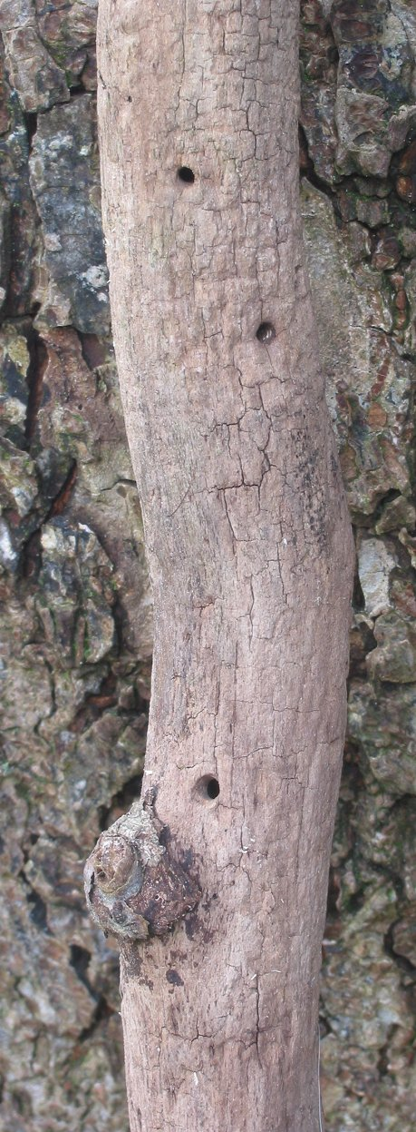 zelfgemaakte foto van door houtworm aangetaste eikentak: half oktober